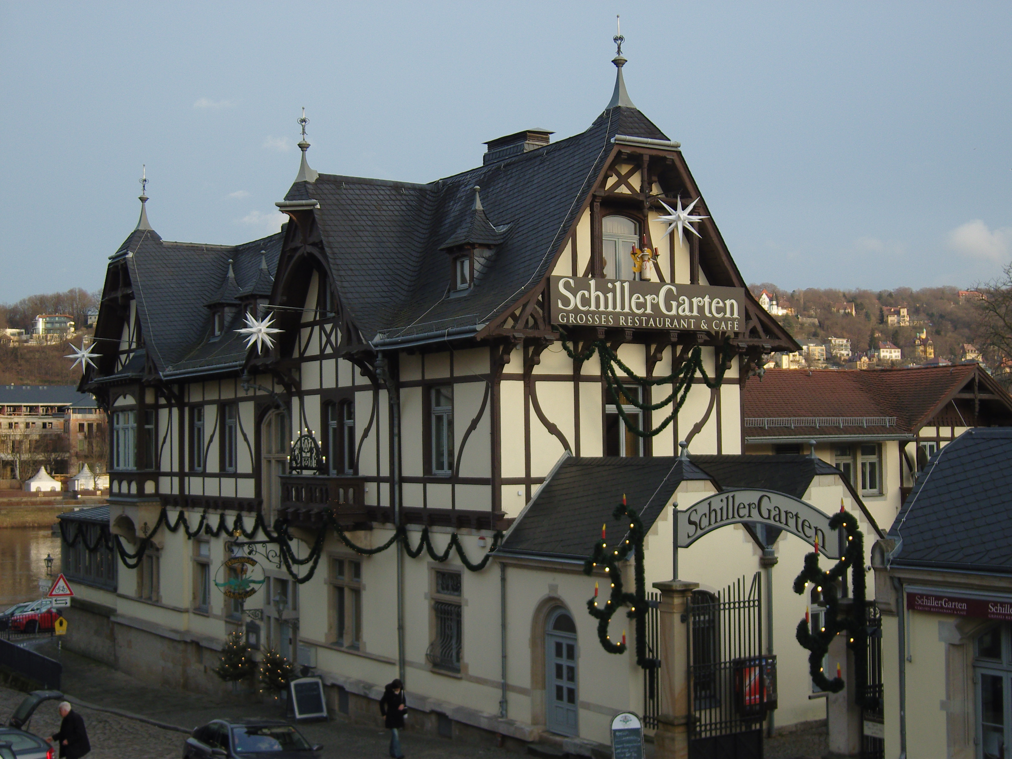 Denkmalgeschütztes Restaurant "Schillergarten" am Schillerplatz 9 in Dresden-Blasewitz